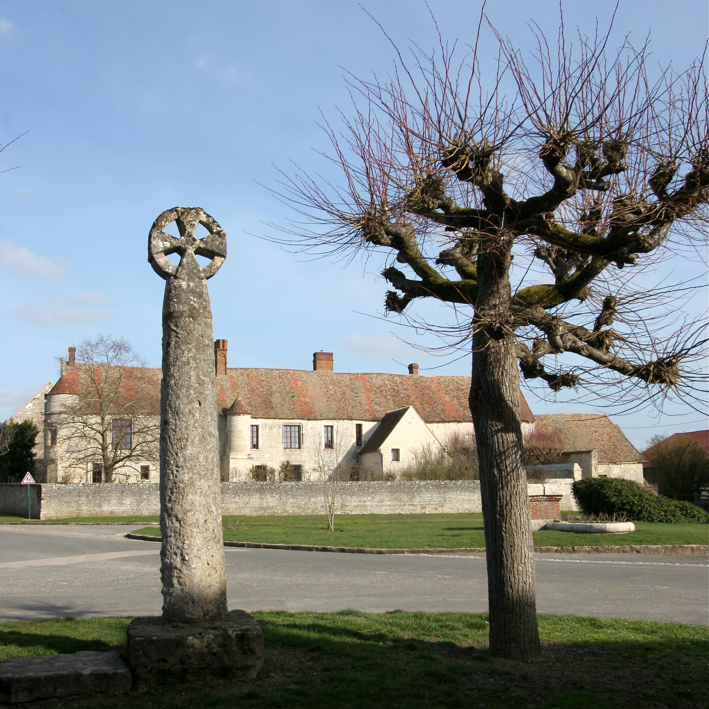 Omerville, Val d'oise, la croix "Fromage" avec en arrière-plan, le manoir d'Omerville, tous deux situés place Saint Martin